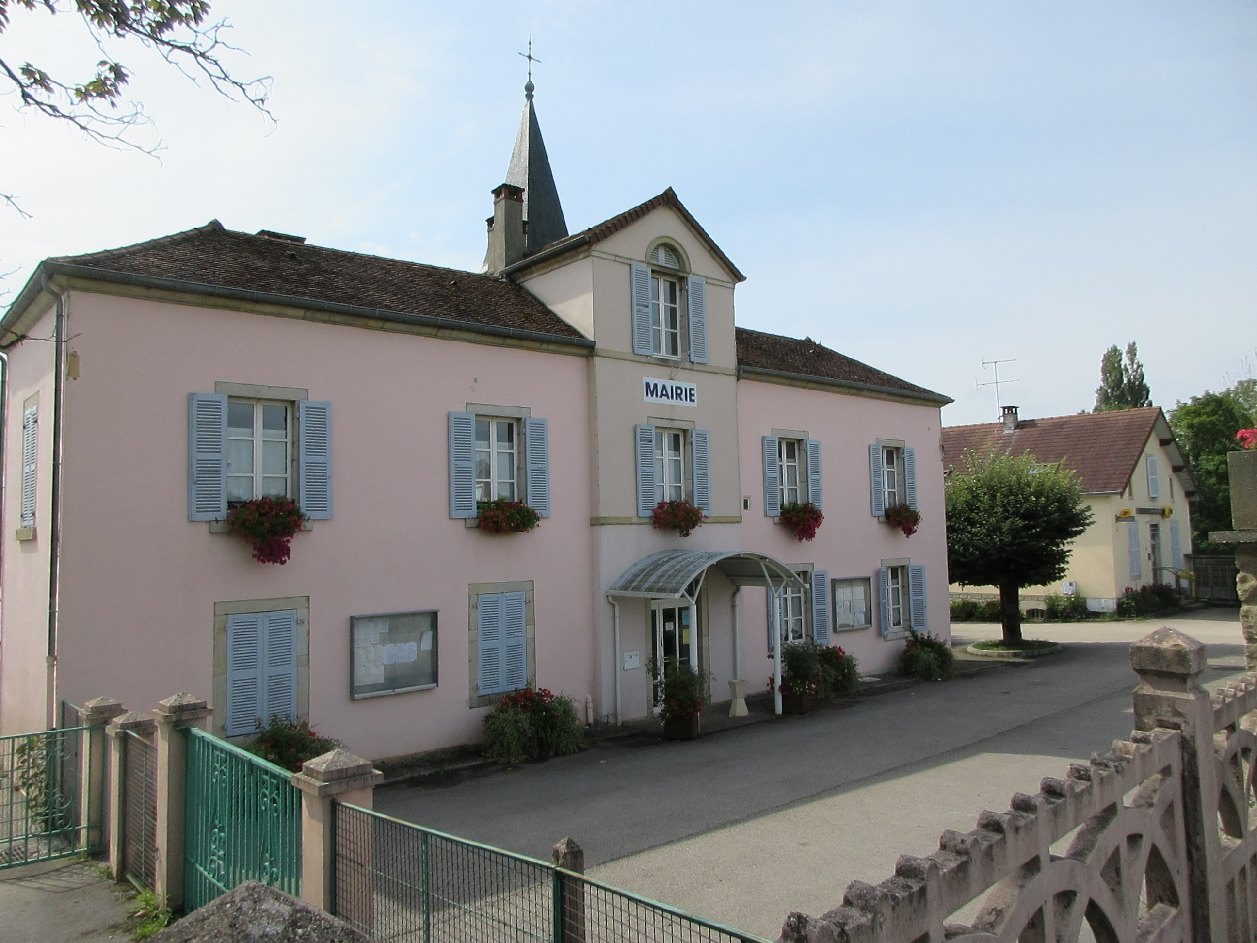 Mairie de Messia-sur-Sorne.